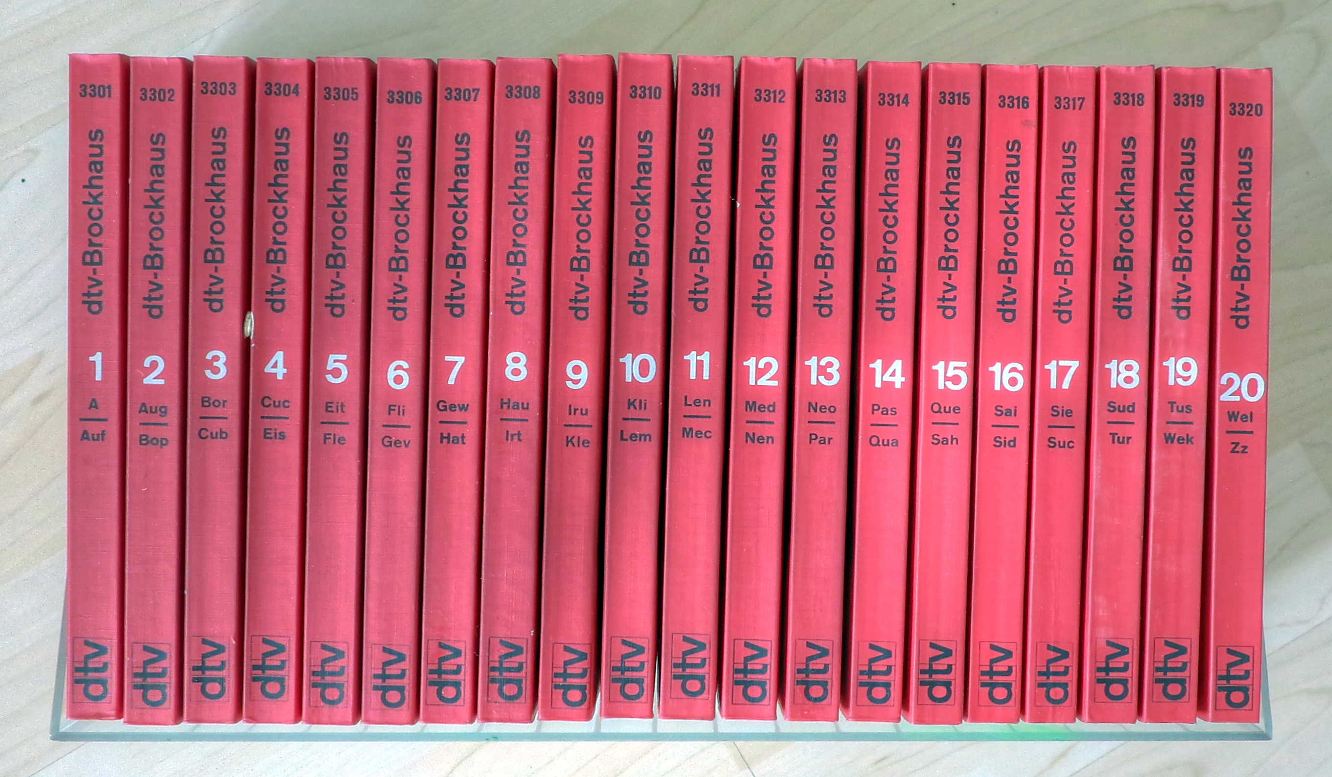 DTV-Brockhaus von 1982 im Plexiglasschuber, 20 bändig im Taschenbuchformat